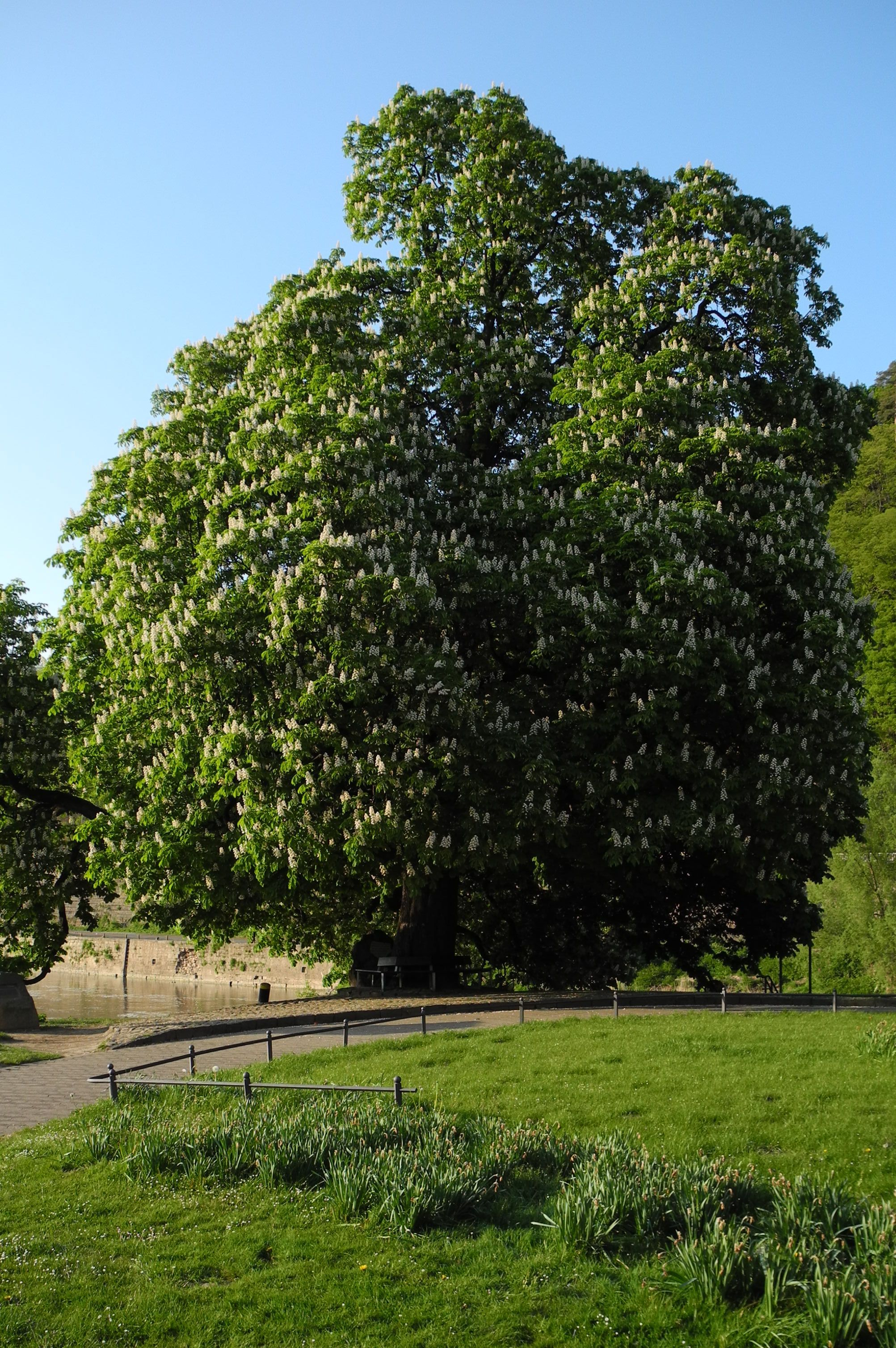 Hann. Münden - Blühende Rosskastanie auf dem Tanzwerder